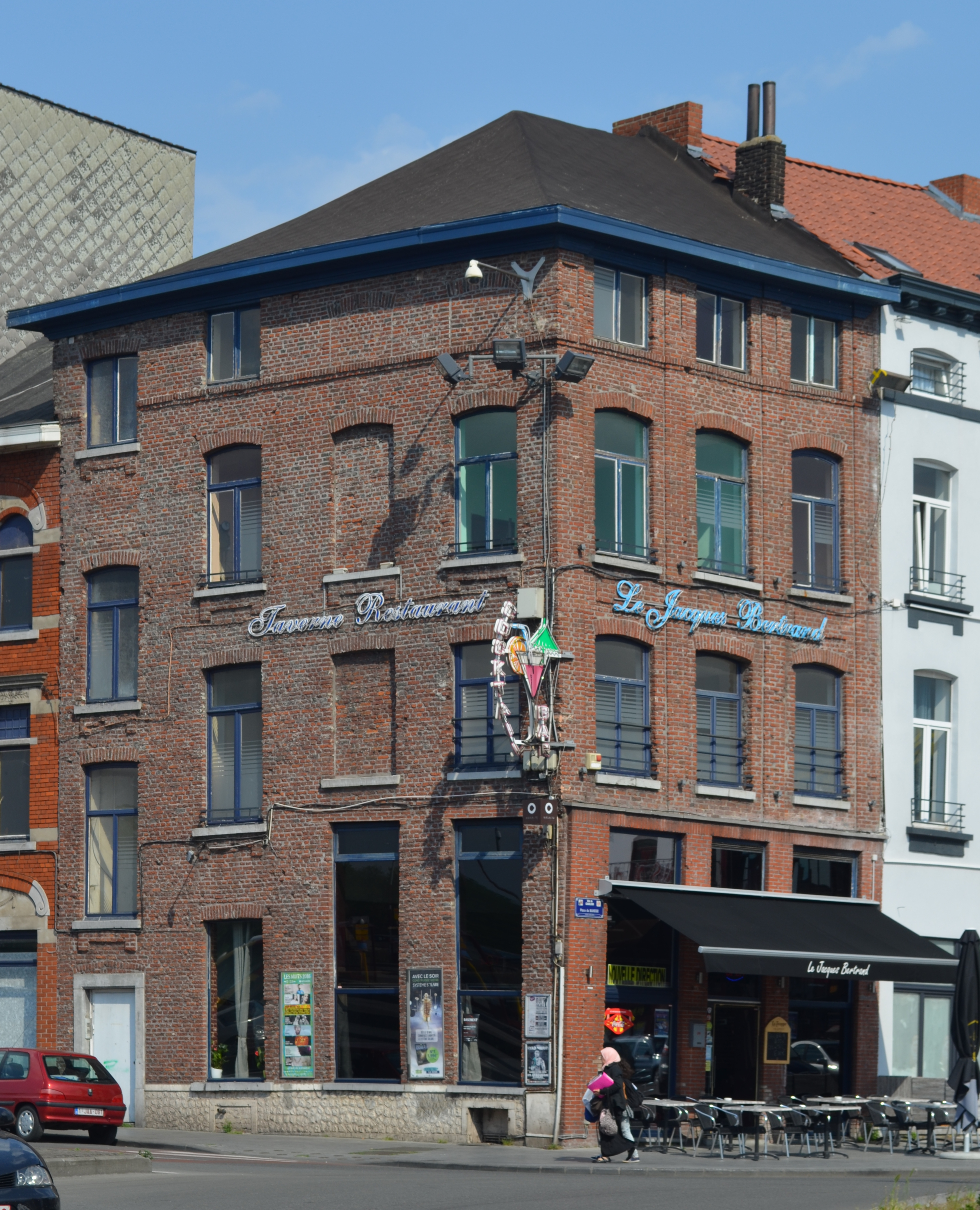 Charleroi - Taverne « Le Jacques Bertrand »